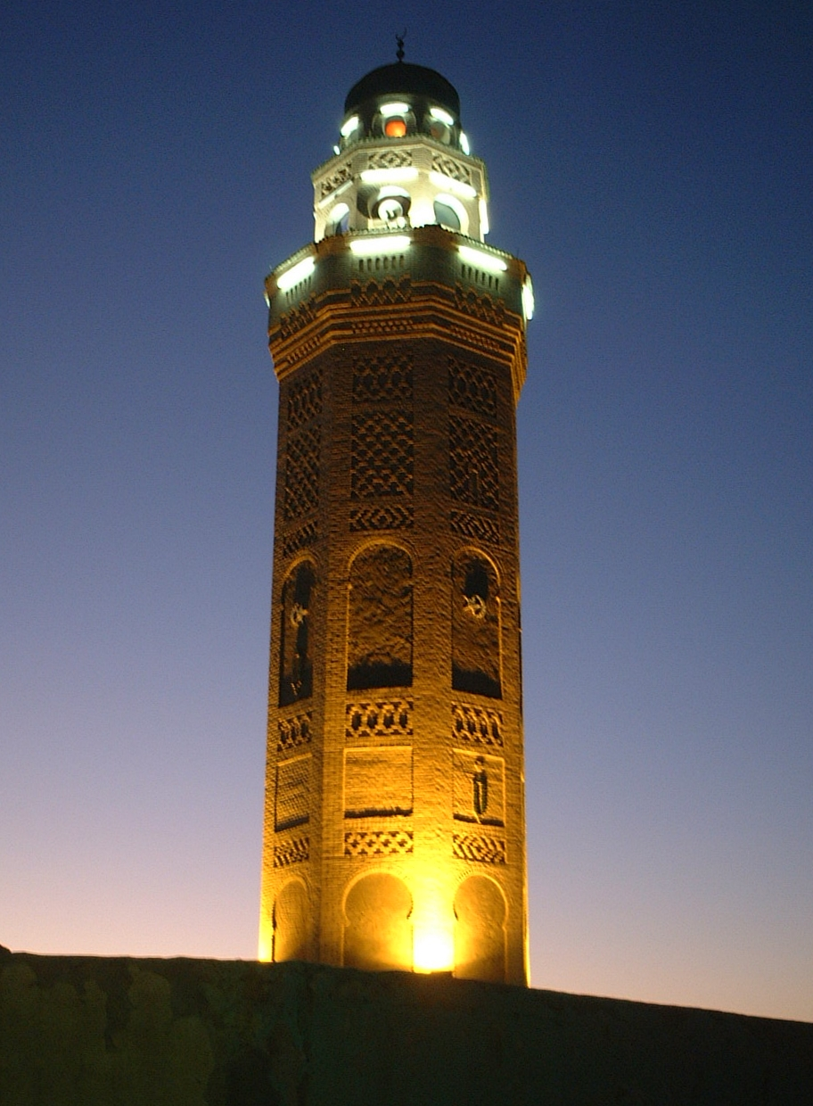 Minaret of a mosque, Tozeur, Tunisia.